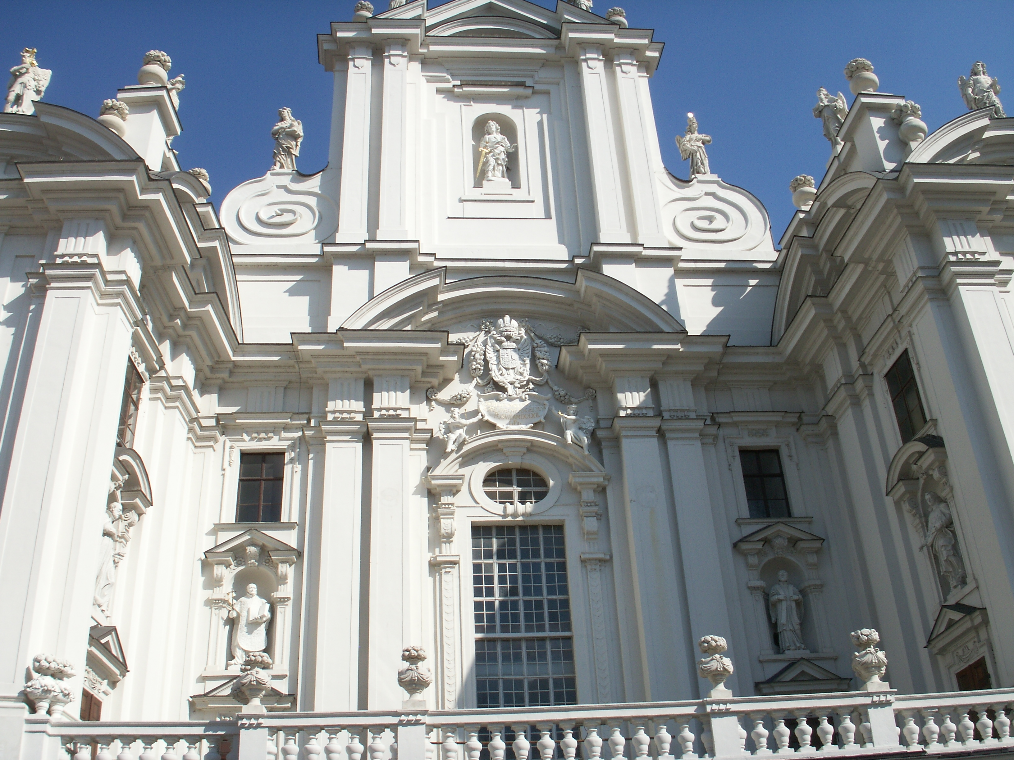 Kirche am Hof, Detail